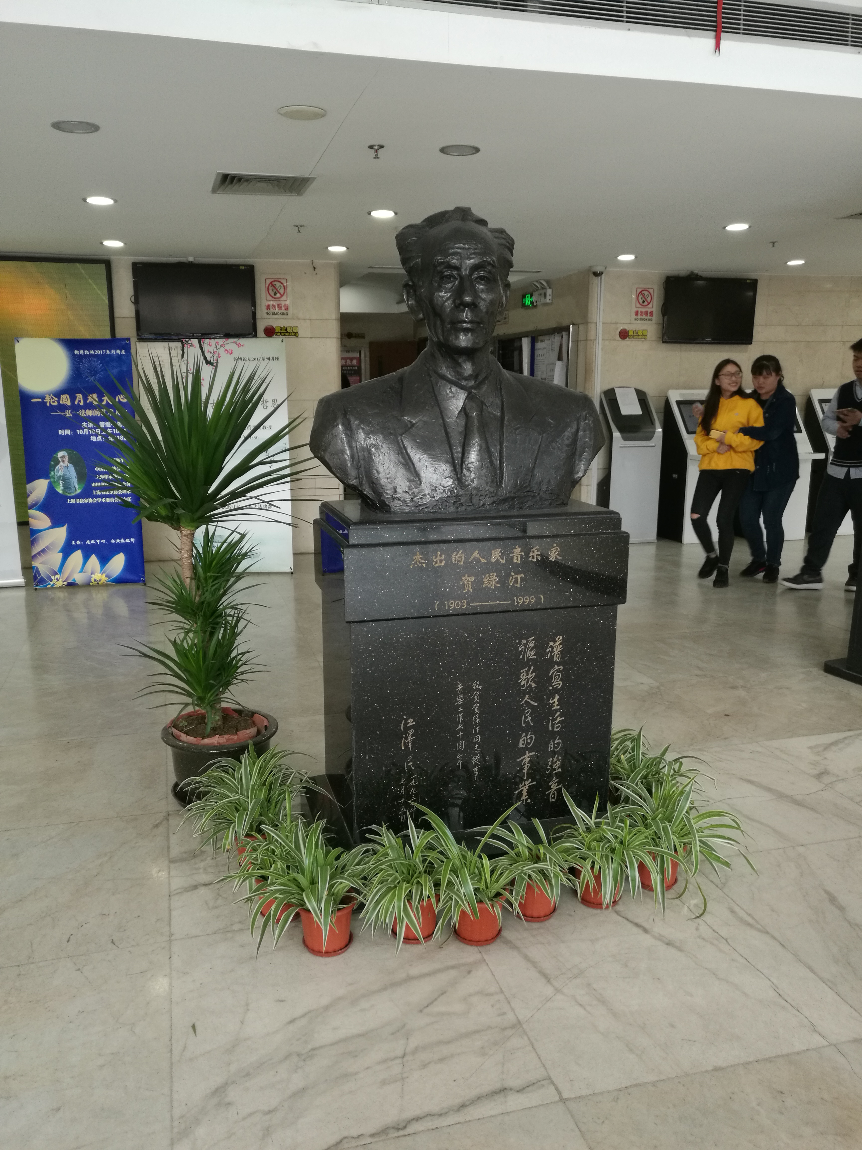 中文（中国大陆）: 位于上海音乐学院内的贺绿汀雕像